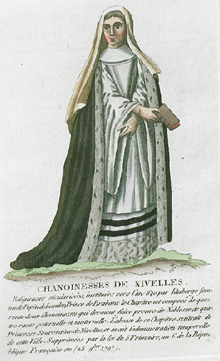 Canonnesse Noble de Saint Gertrude, Nivelles